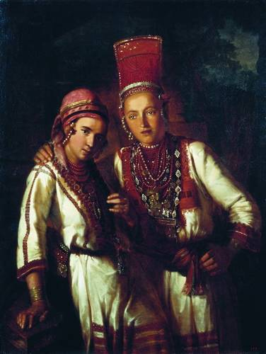 Мордовский республиканский музей изобразительных искусств им. С.Д.Эрьзи, Холст, масло 133х105